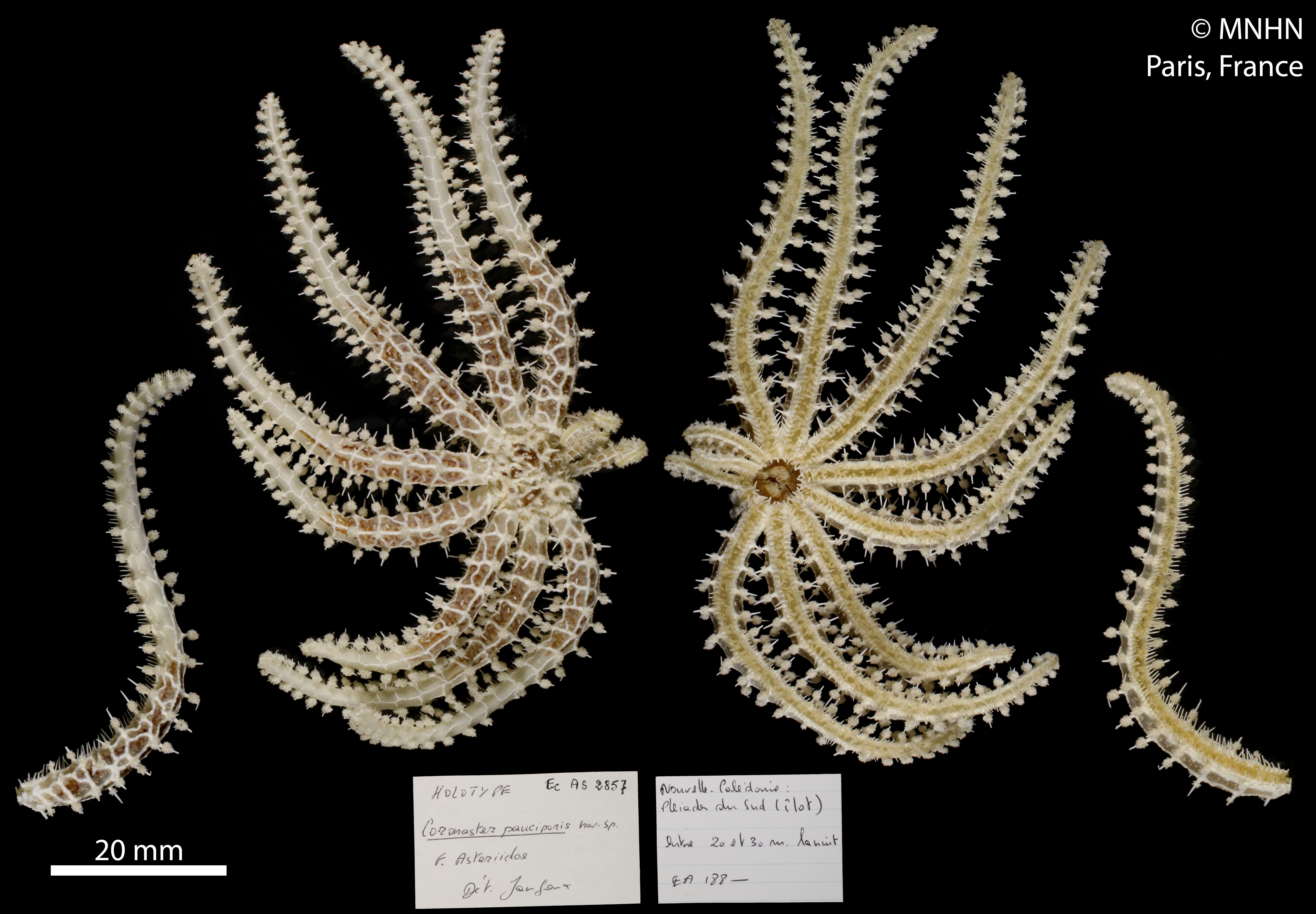 Coronaster pauciporisSpécimen MNHN-IE-2014-80Collection : Échinodermes (IE)Muséum National d'Histoire Naturelle (Paris, France) Origine : Libellé du pays : NOUVELLE-CALEDONIE Localité/Lieu-dit : Ouvéa, îlot Guétié Localité originale : Pléiades du sud Océan : Pacifique sud Profondeur (mètres) : 20 -30